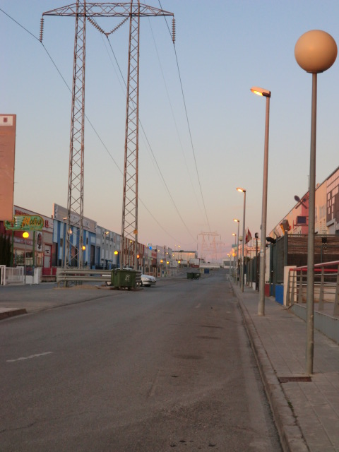 Calle del Polígono Industrial Los Cerros - Úbeda (Jaén)